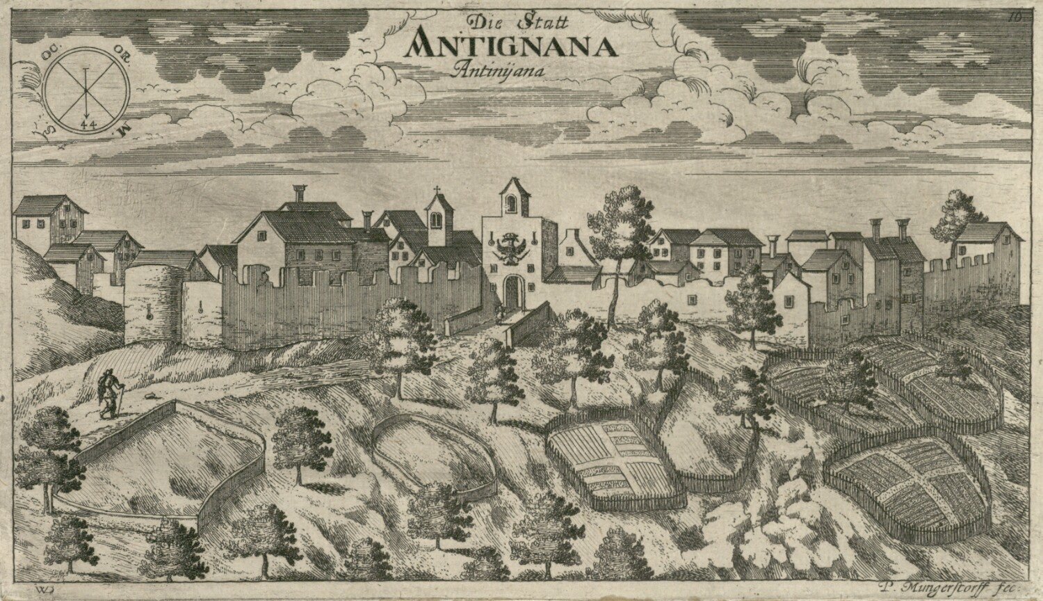 Tinjan